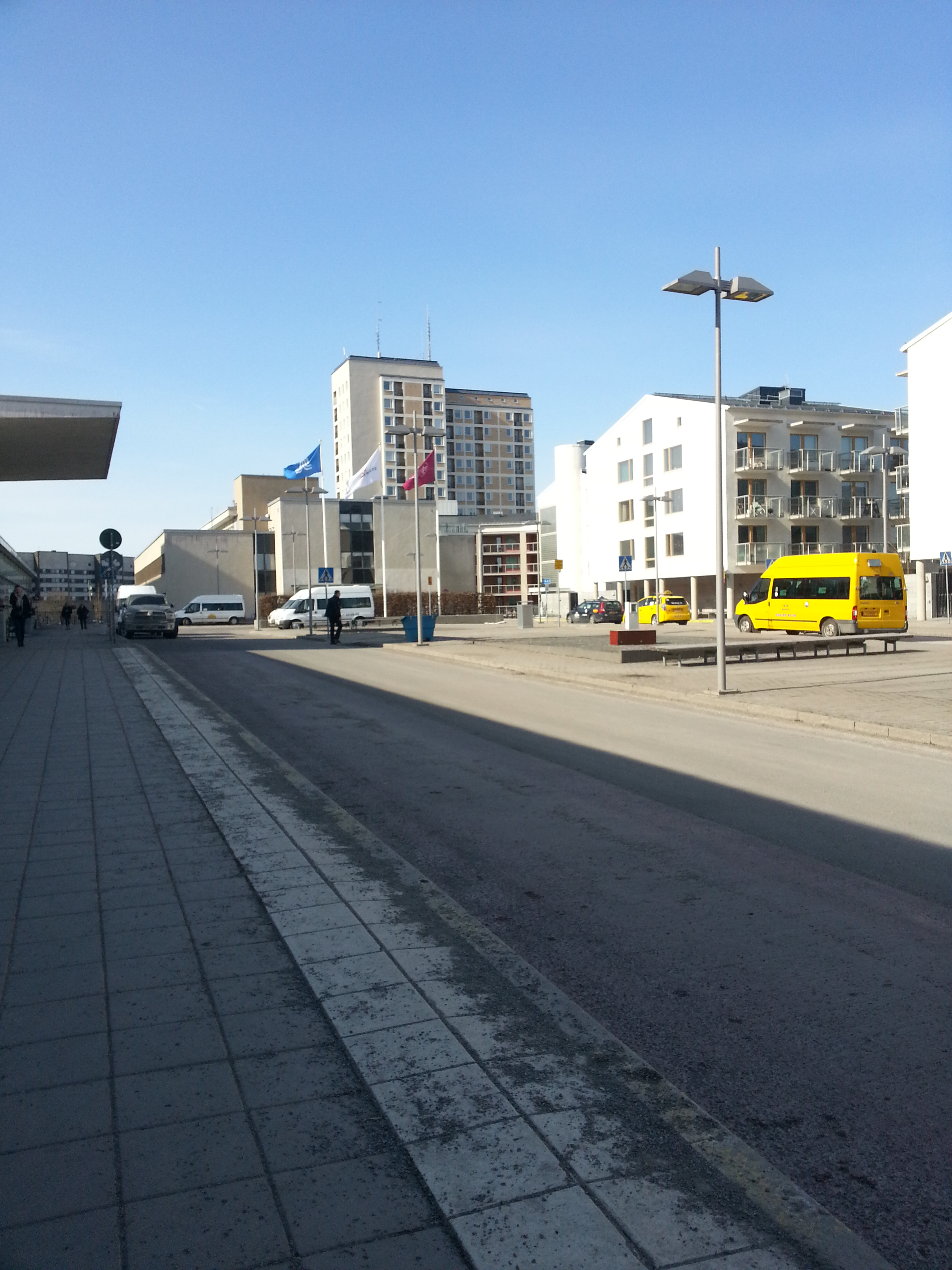 Marmorskrapan i bakgrunden, som tillhör Marmorlunden brf.